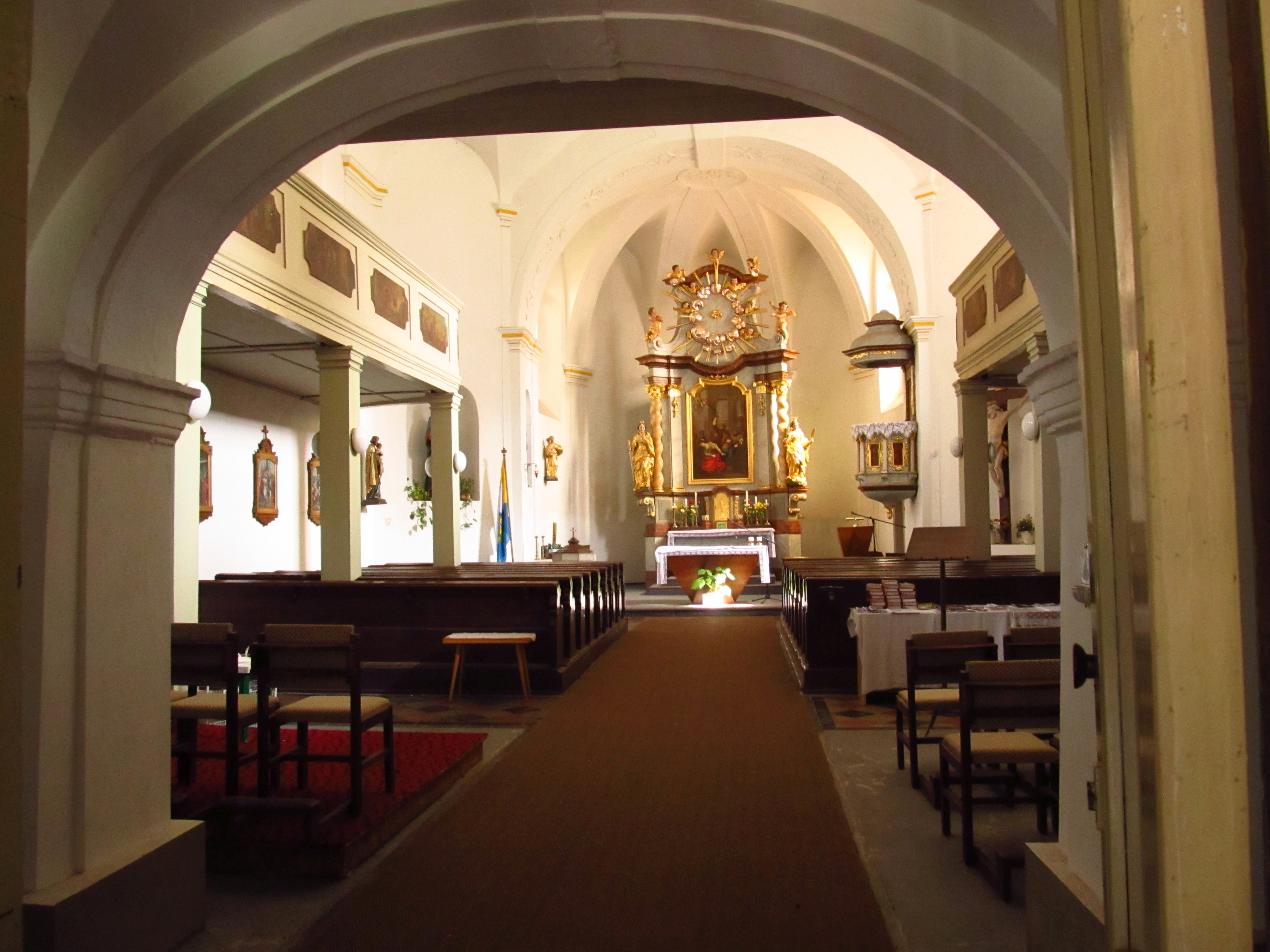 Kostel svaté Kateřiny, Stráž nad Nisou.